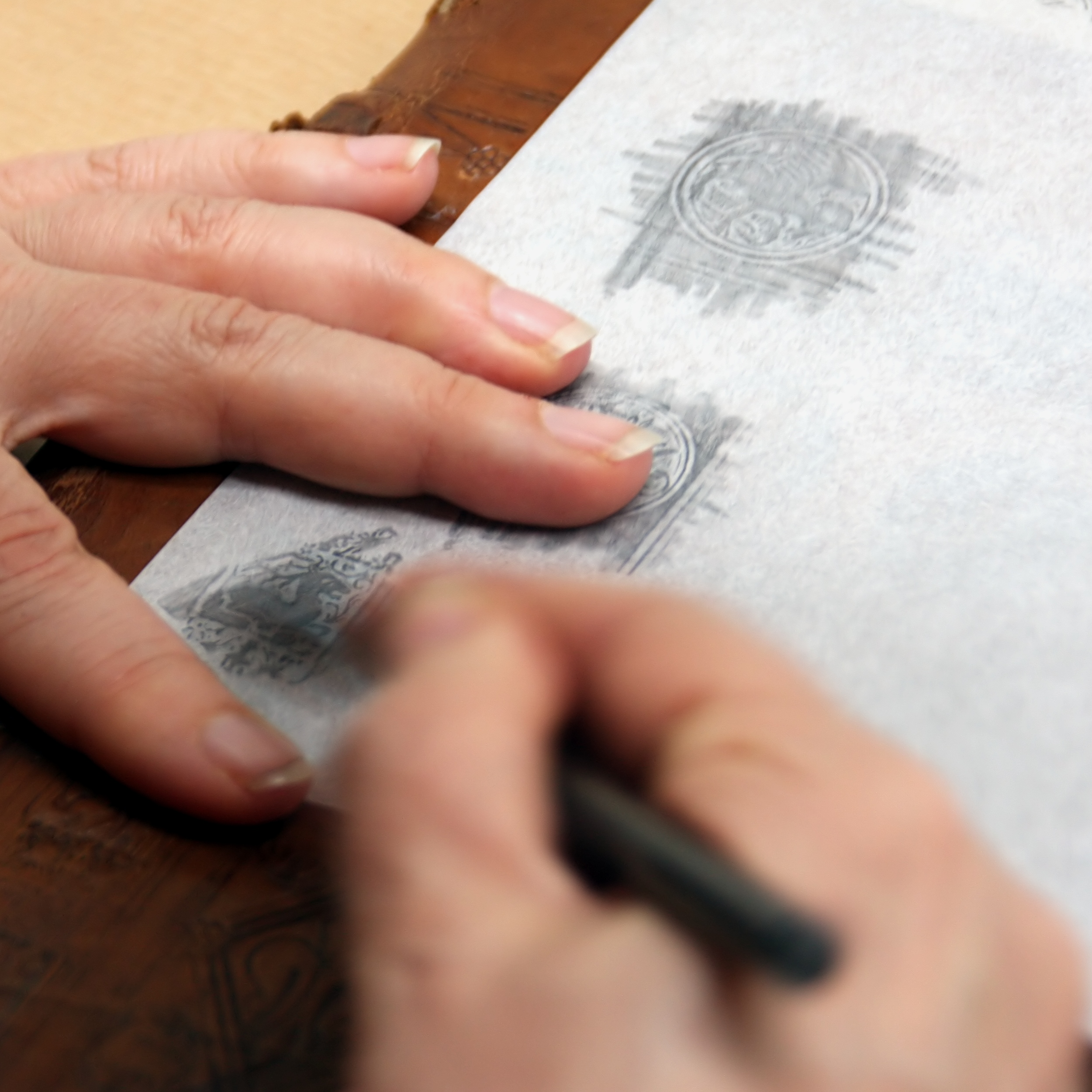 Durchreibung eines Stempels von einem alten Bucheinband. Das Foto entstand während einer Führung durch die Bibliothek des Kölnischen Stadtmuseums